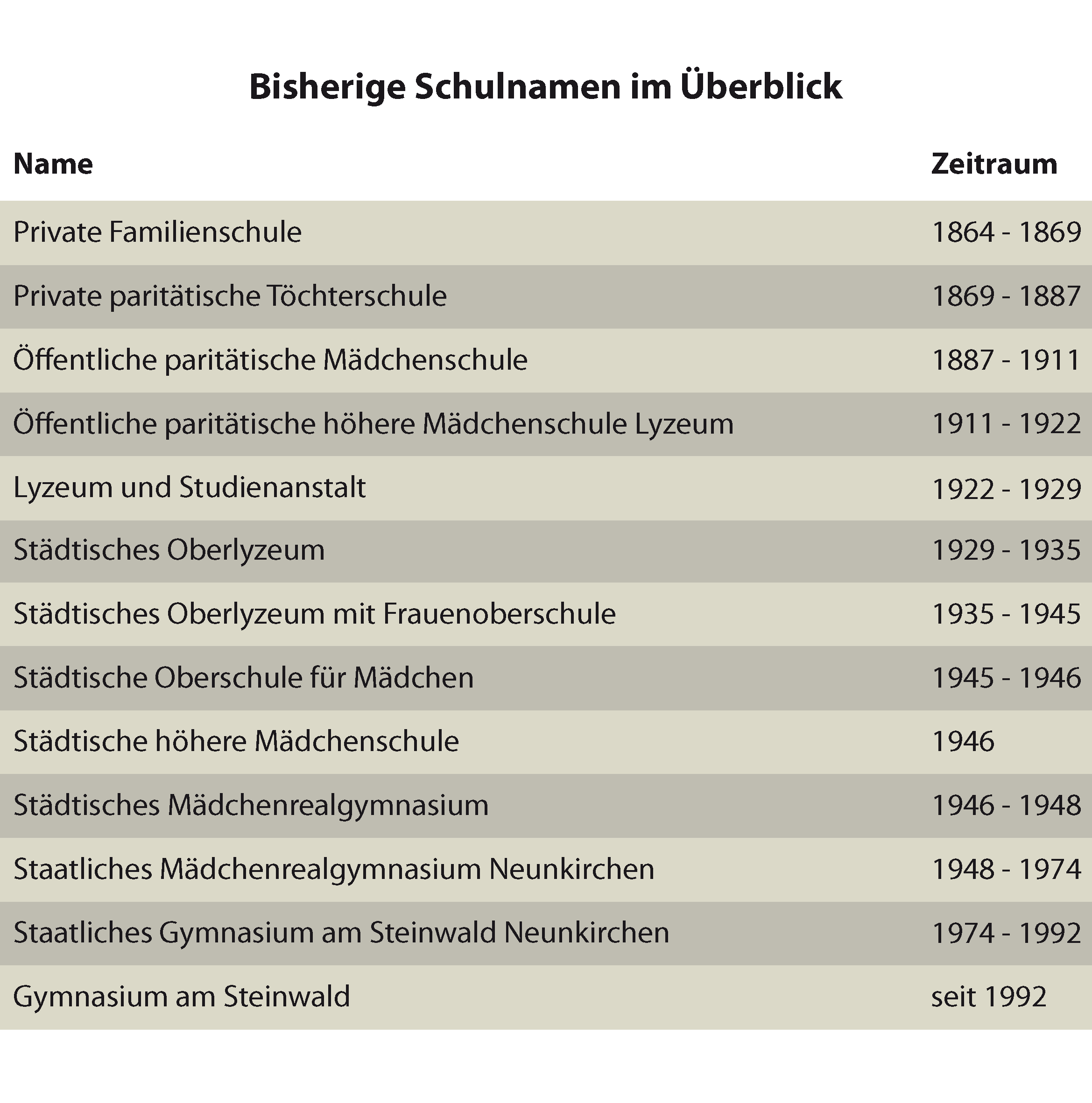 Schulnamen des GaS seit 1864 im Überbrlick (Stand 01/2012).